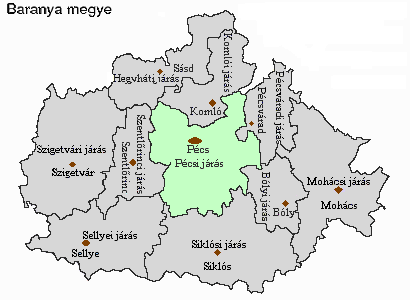 Magyarország, Baranya megye, Pécsi járás